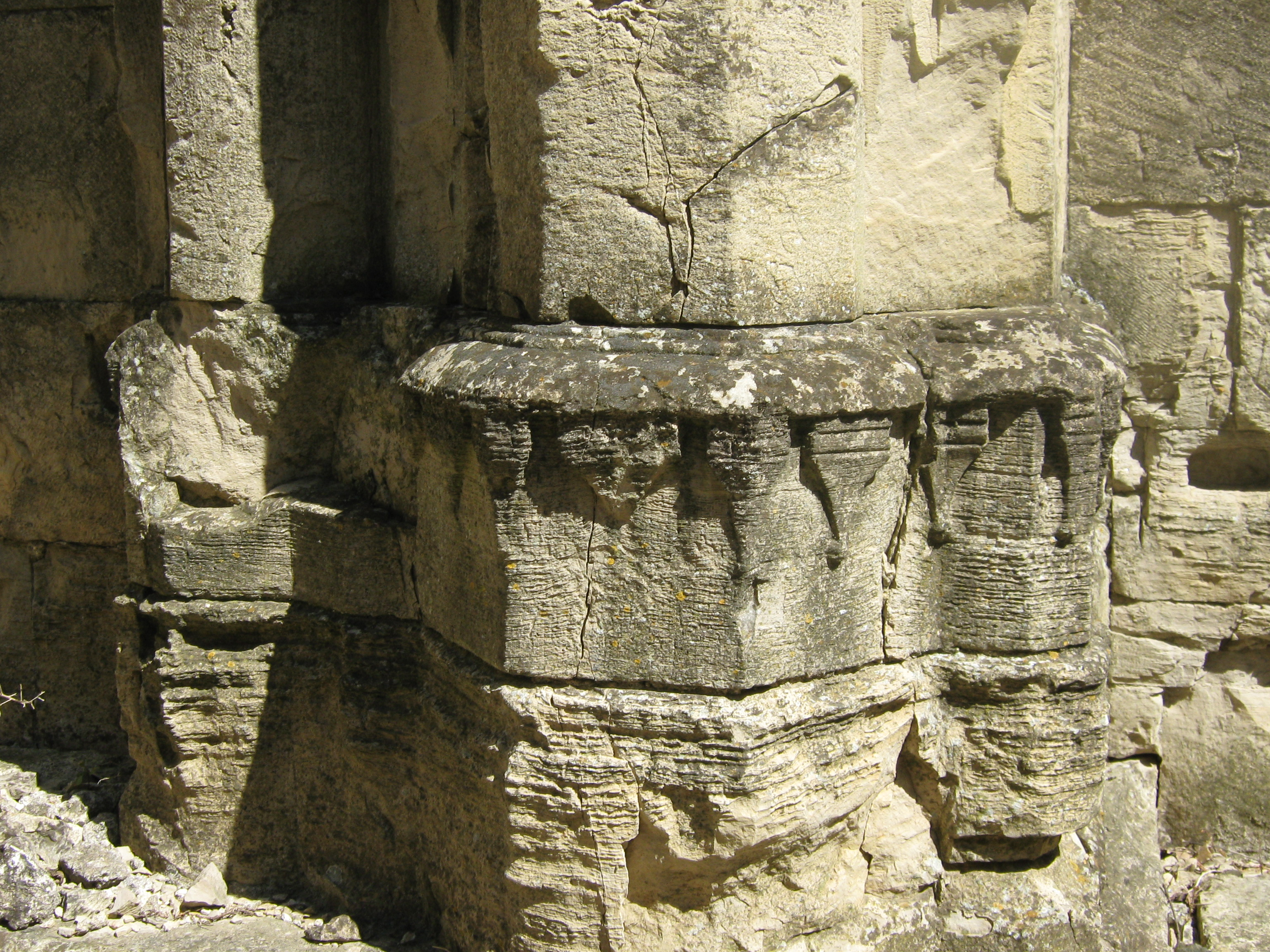 Vue de l’intérieur du chevet.